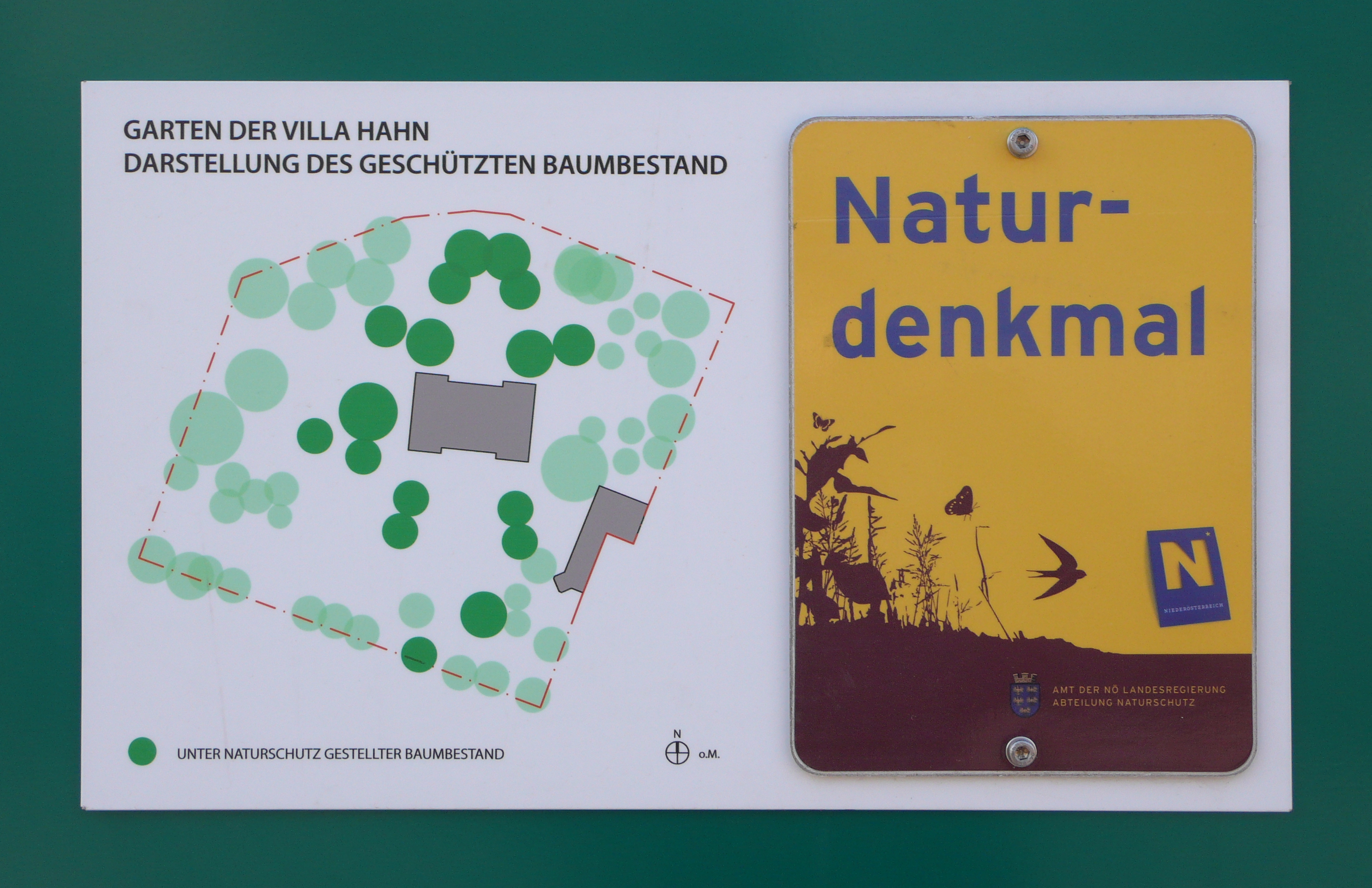 Garten der Villa Hahn, Darstellung des unter Naturschutz gestellten Baumbestands. This media shows the natural monument in Lower Austria with the ID BN-125.